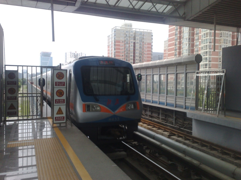 北京地铁十三号线五道口站